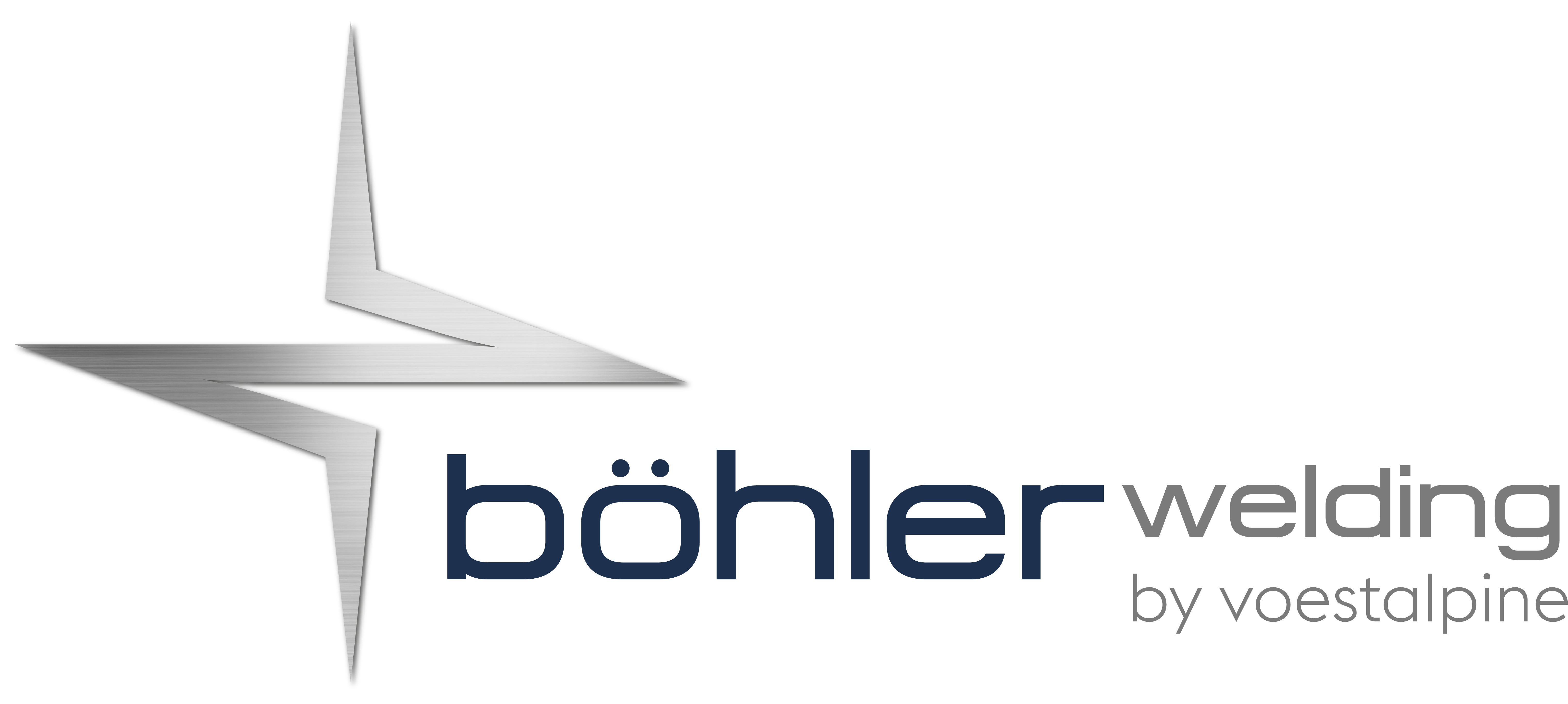 Lasting Connections